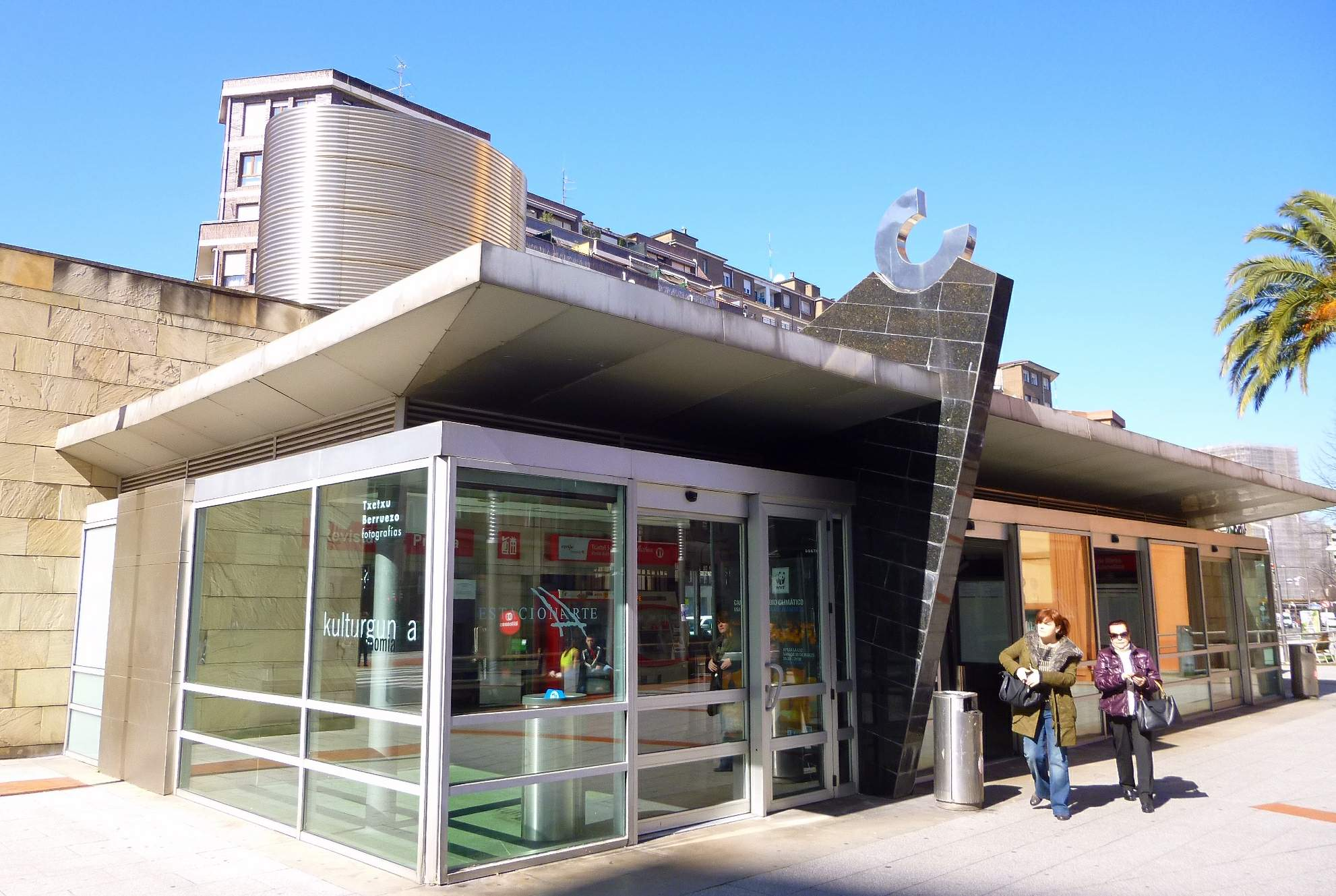 Estación de Autonomía (de Cercanías Renfe), en Bilbao (Vizcaya).